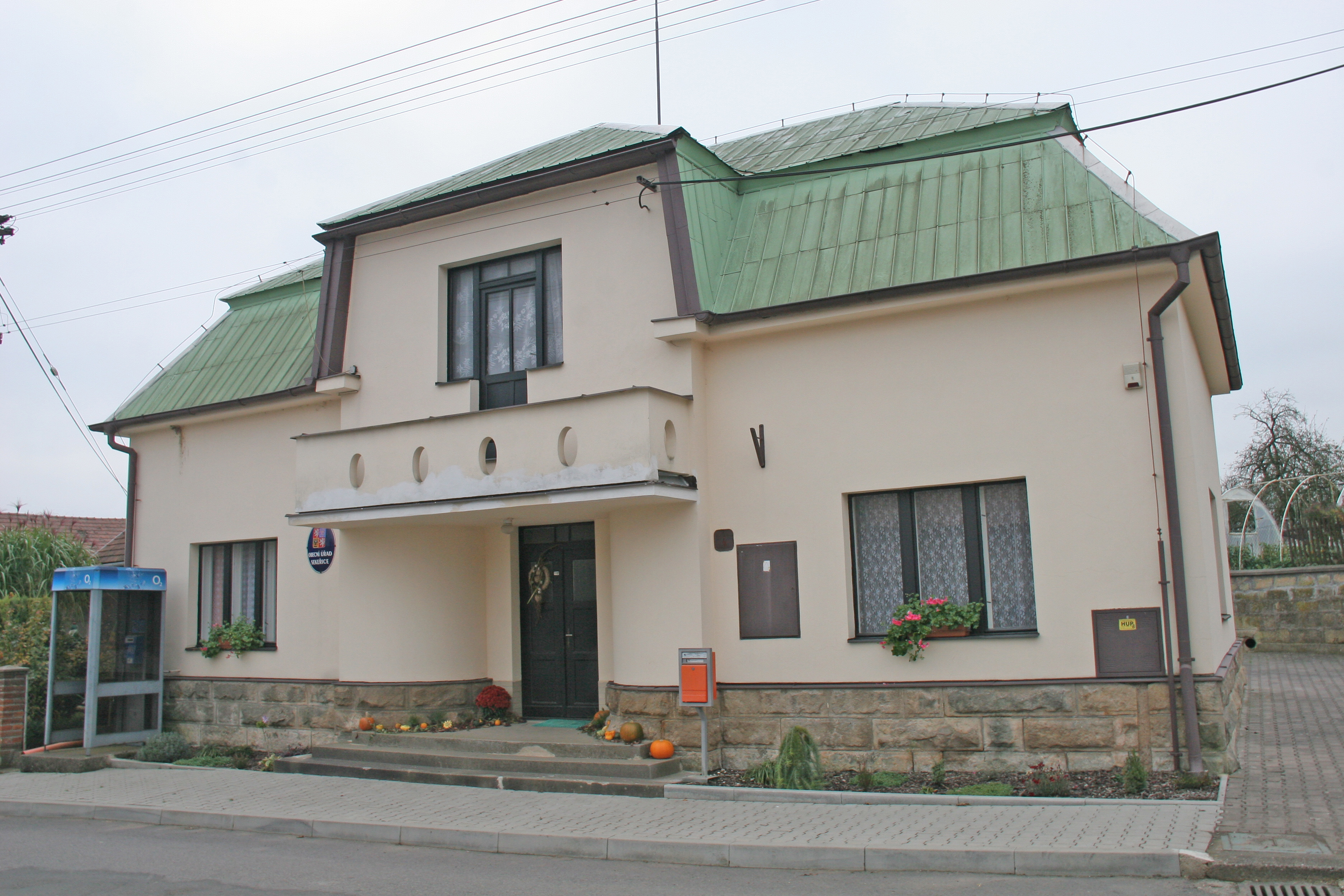 Sekeřice obecní úřad